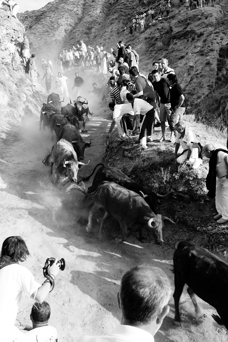 Faltzesko piloiaren entzierroa.